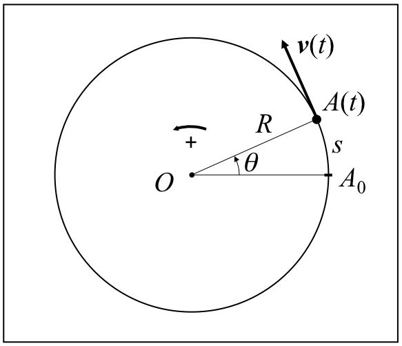 Higidura zirkularra planoa erakusten duen irudi eskematikoa.